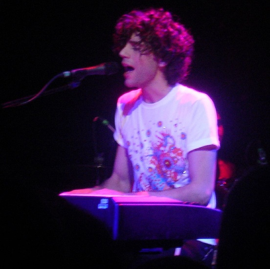 Mika au clavier lors d'un concert dans la salle The Troubadour, en mars 2007.